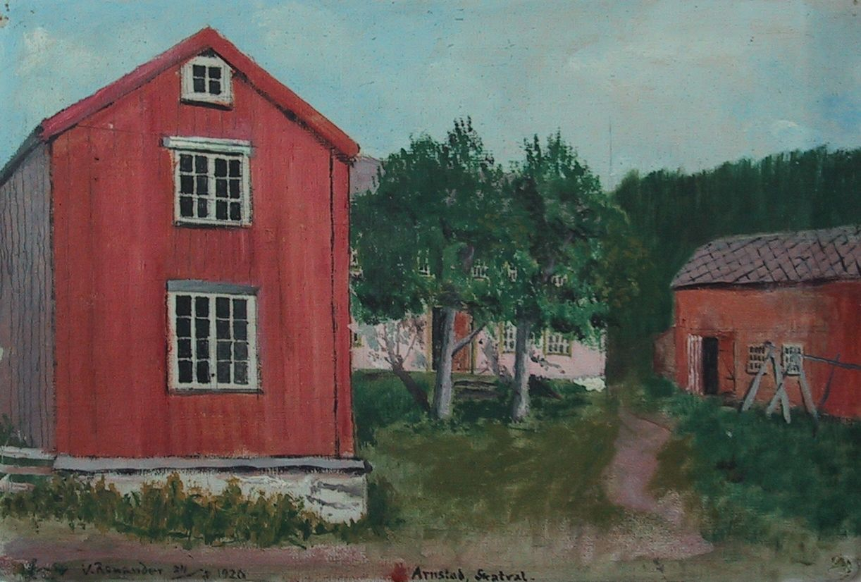 Norwegian: Arnstad på Skatval.label QS:Lno,"Arnstad på Skatval." (Østre Arnstad)